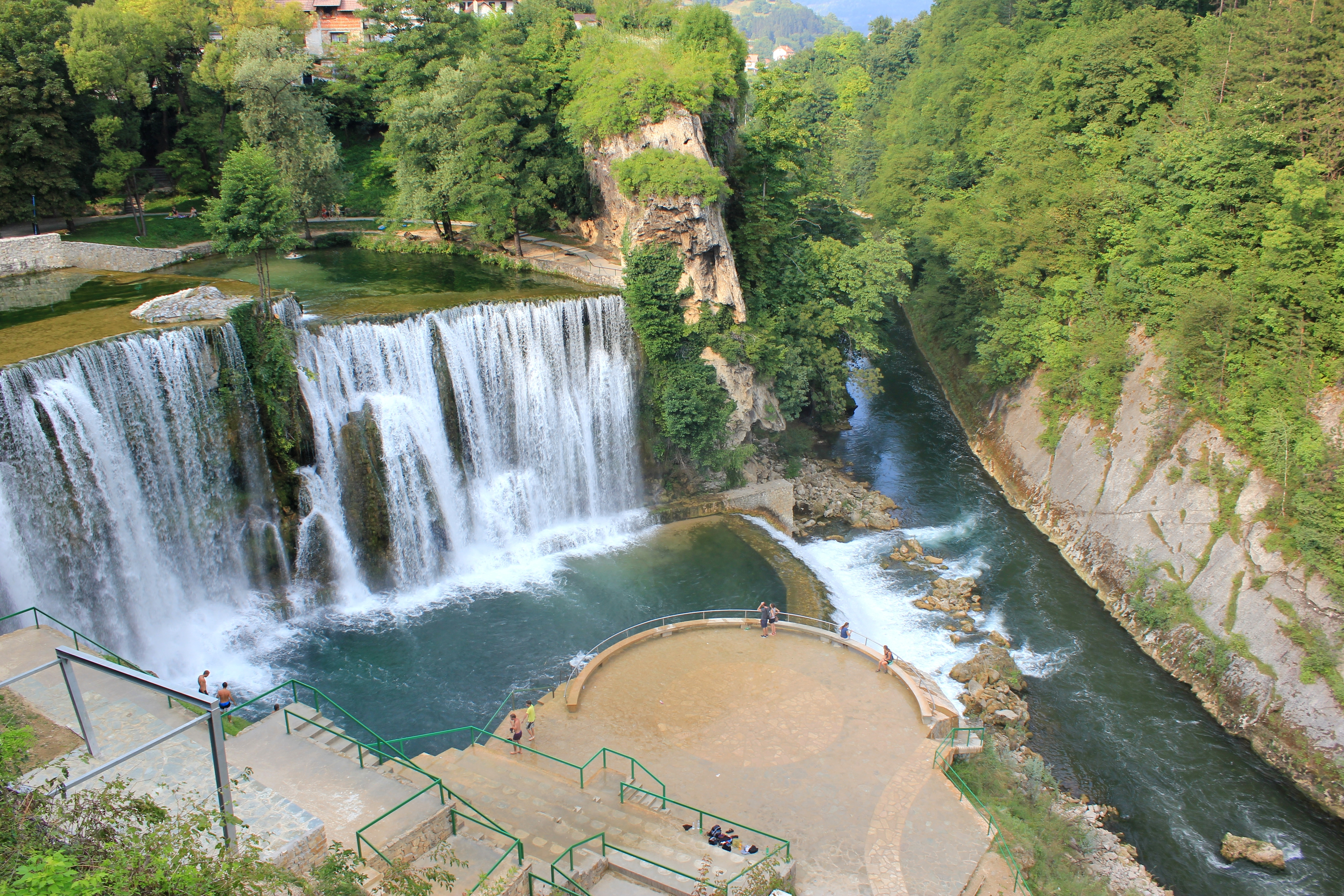 Pliva-Wasserfall in Jajce, unten der Vrbas